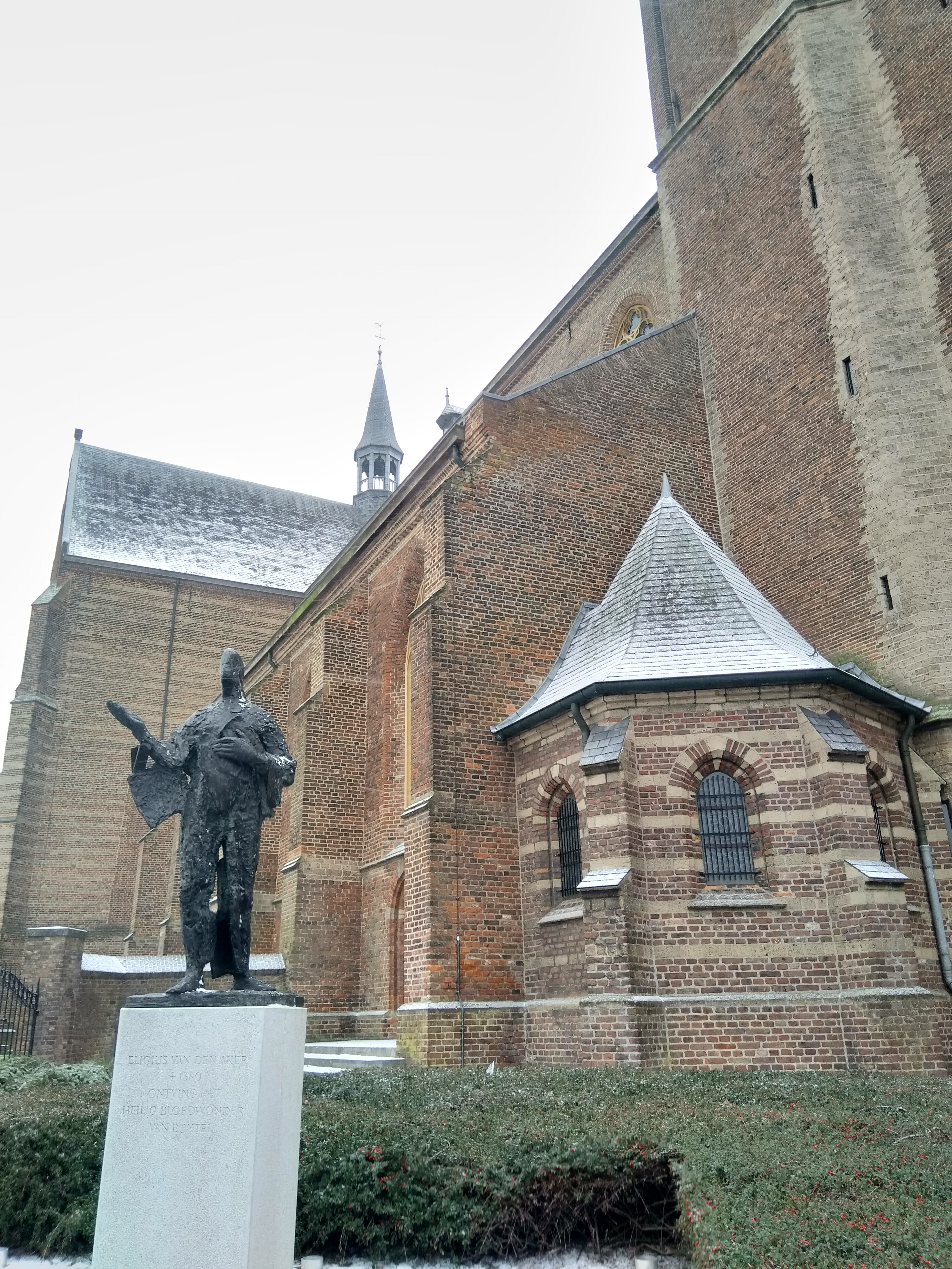 Standbeeld van Eligius van den Aker. Van den Aker ontving het Heilig Bloedwonder kort voor 1380 in Boxtel.